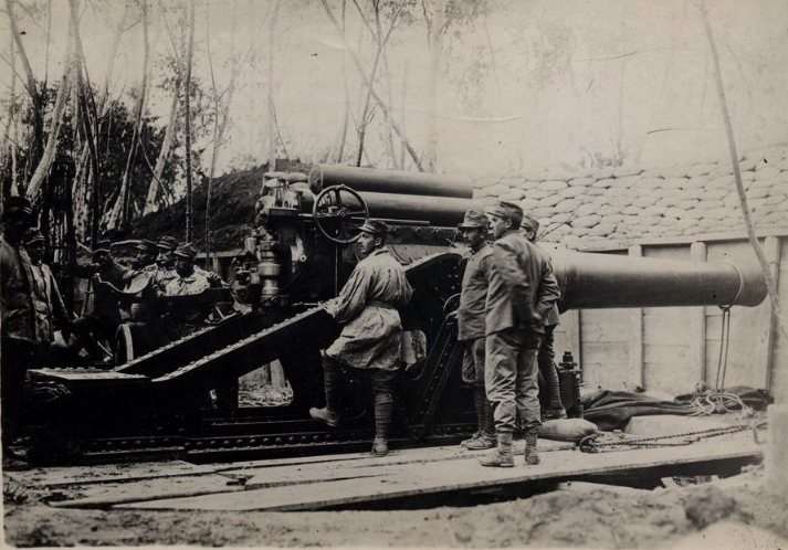 obice 305/17